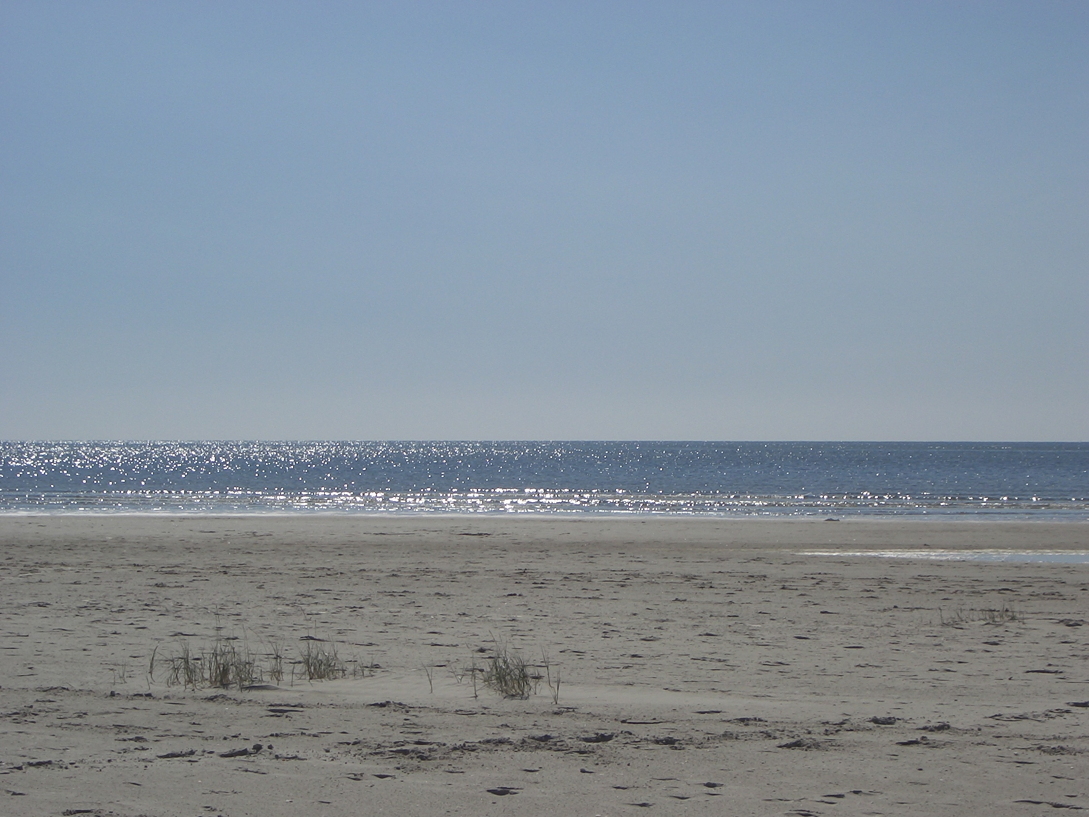 Meer Böhler Strand